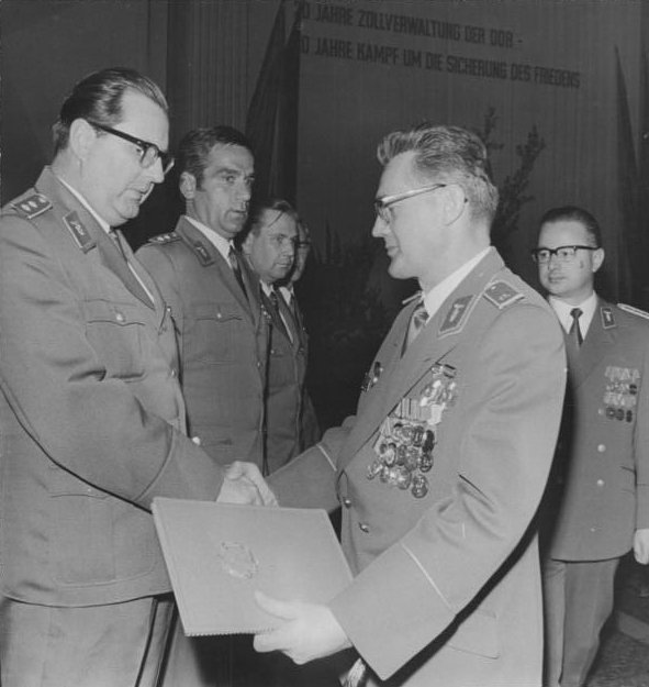 ADN-ZB Katscherowski 24.8.72 Berlin: Ehrung für Mitarbeiter und Kollektive der DDR-Zollverwaltung. Bewährte Mitarbeiter und Kollektive der Zollverwaltung der DDR wurden am 24.8.72 anläßlich des 20. Jahrestages des sozialistischen Zollwesens mit Auszeichnungen geehrt. Zu den vom Leiter der Zollverwaltung, Zollchefinspekteur Gerhard Stauch (r), ausgezeichneten, gehörte das Dienstkollektiv des Binnenzollamtes Cottbus (Foto), für das der Leiter des Amtes, Zollkommissar Helmut Bich (l), die Urkunde für den Titel "Sozialistisches Dienstkollektiv der Zollverwaltung der DDR" entgegennahm.